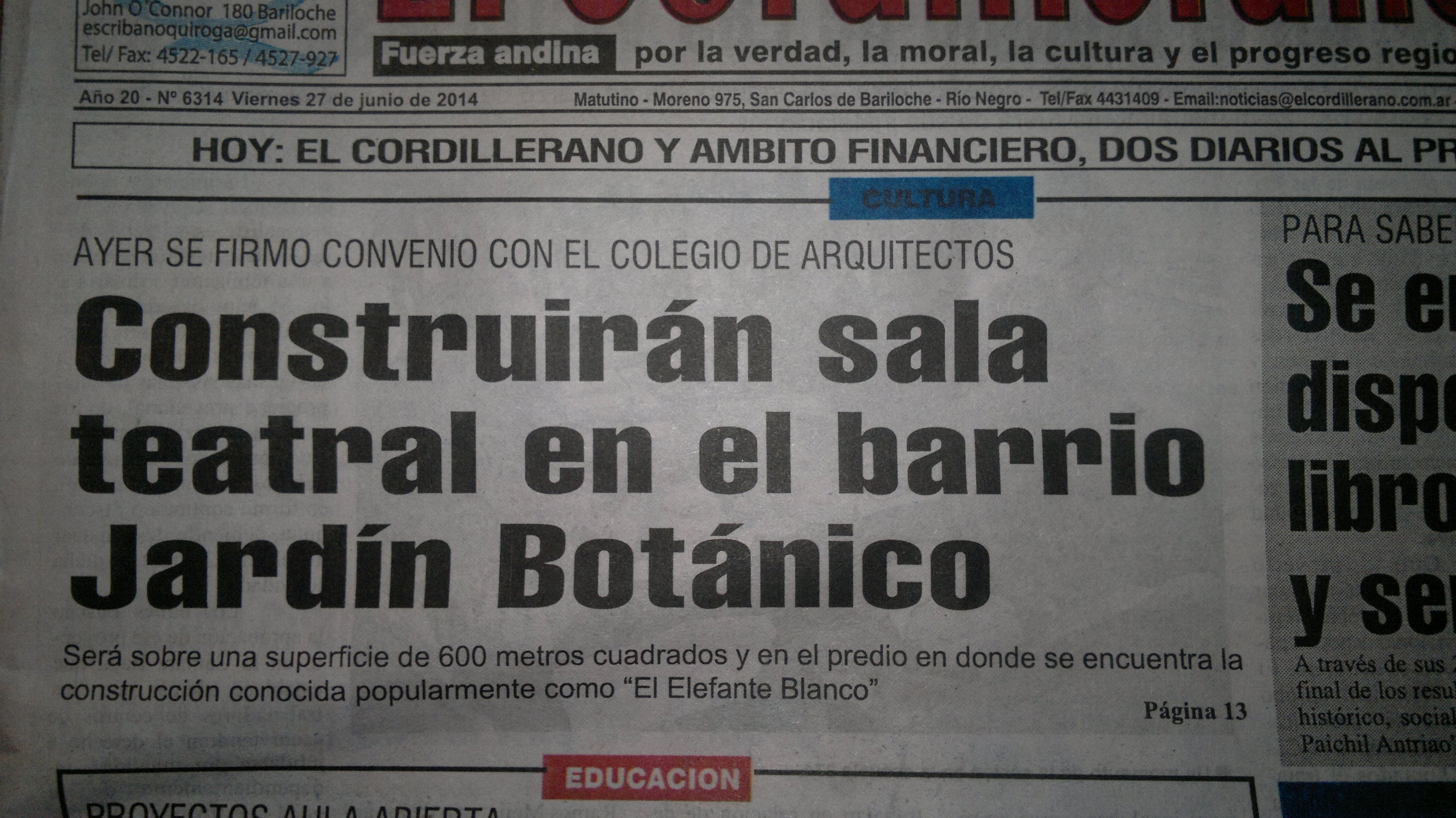 Anuncio publicado en Junio de 2014.